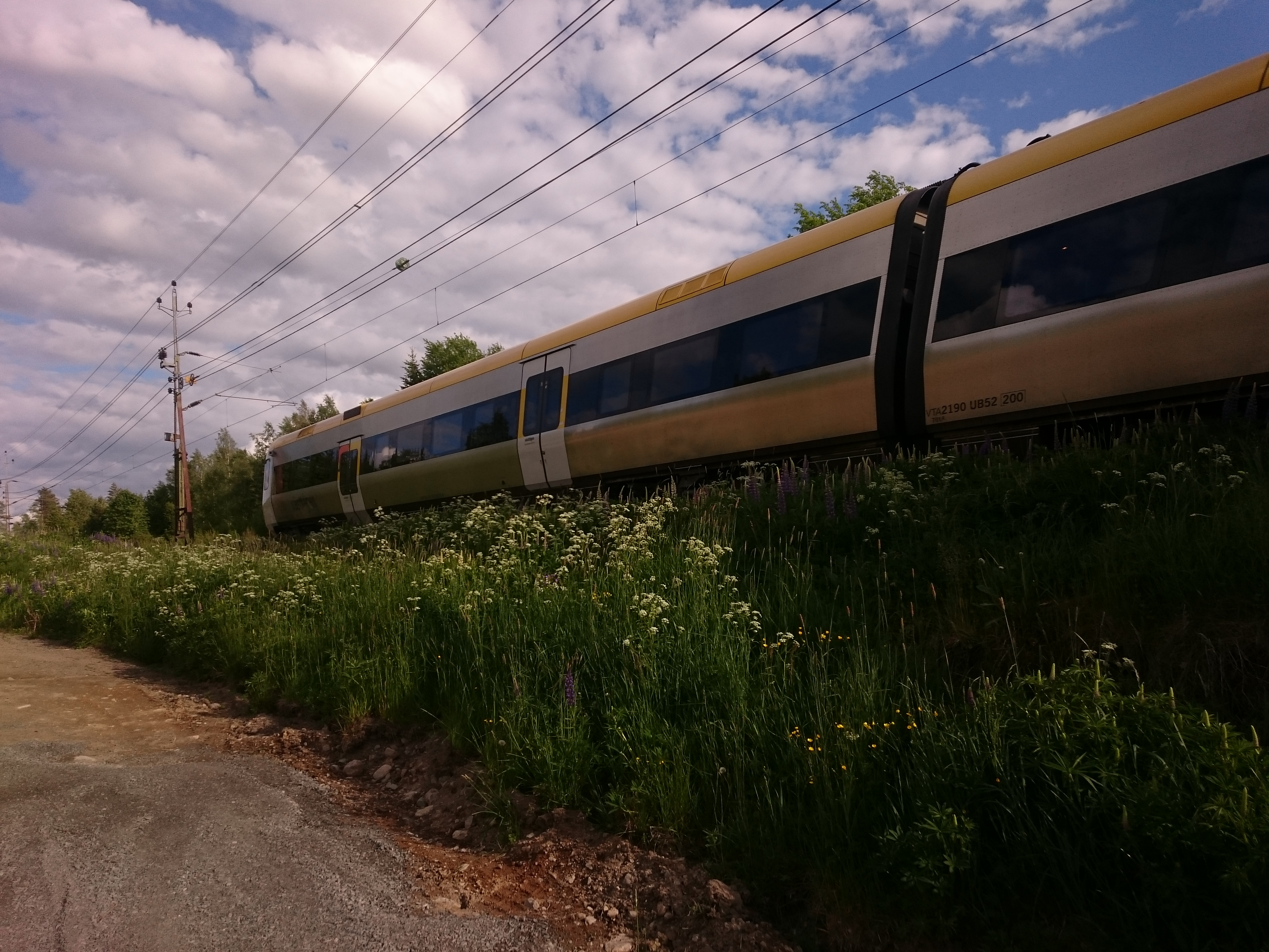 Ett Västtåg strax utanför Nässjö. Fordonet är en Regina X5?